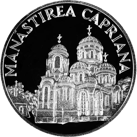 Монета Молдови Кепріанський монастир